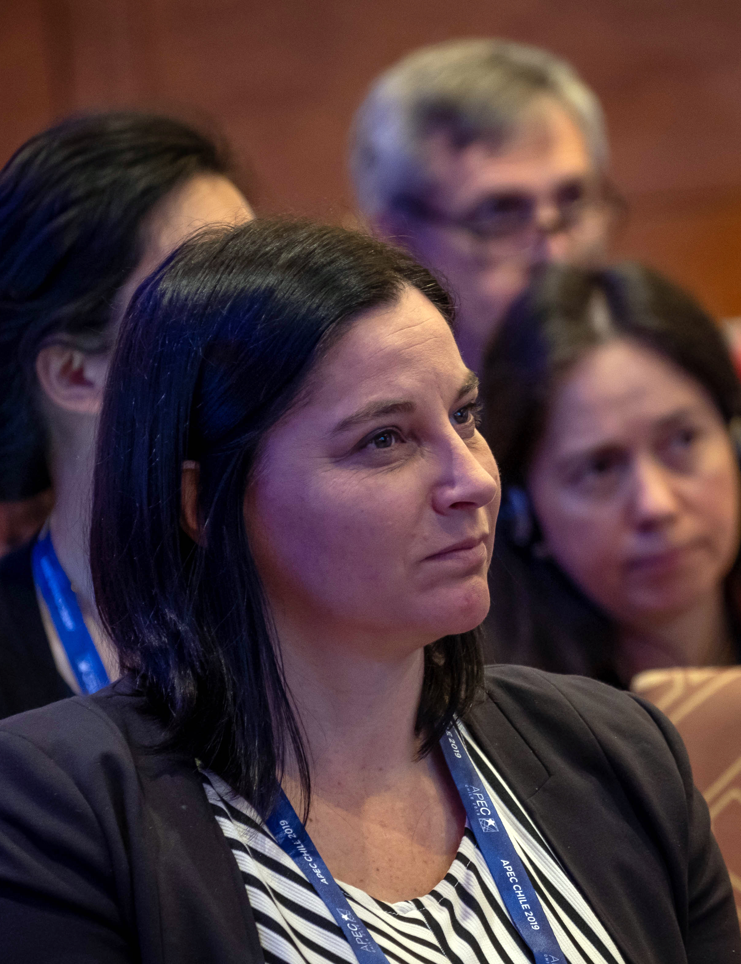 Abogada chilena, comisionada de la Comisión para el Mercado Financiero